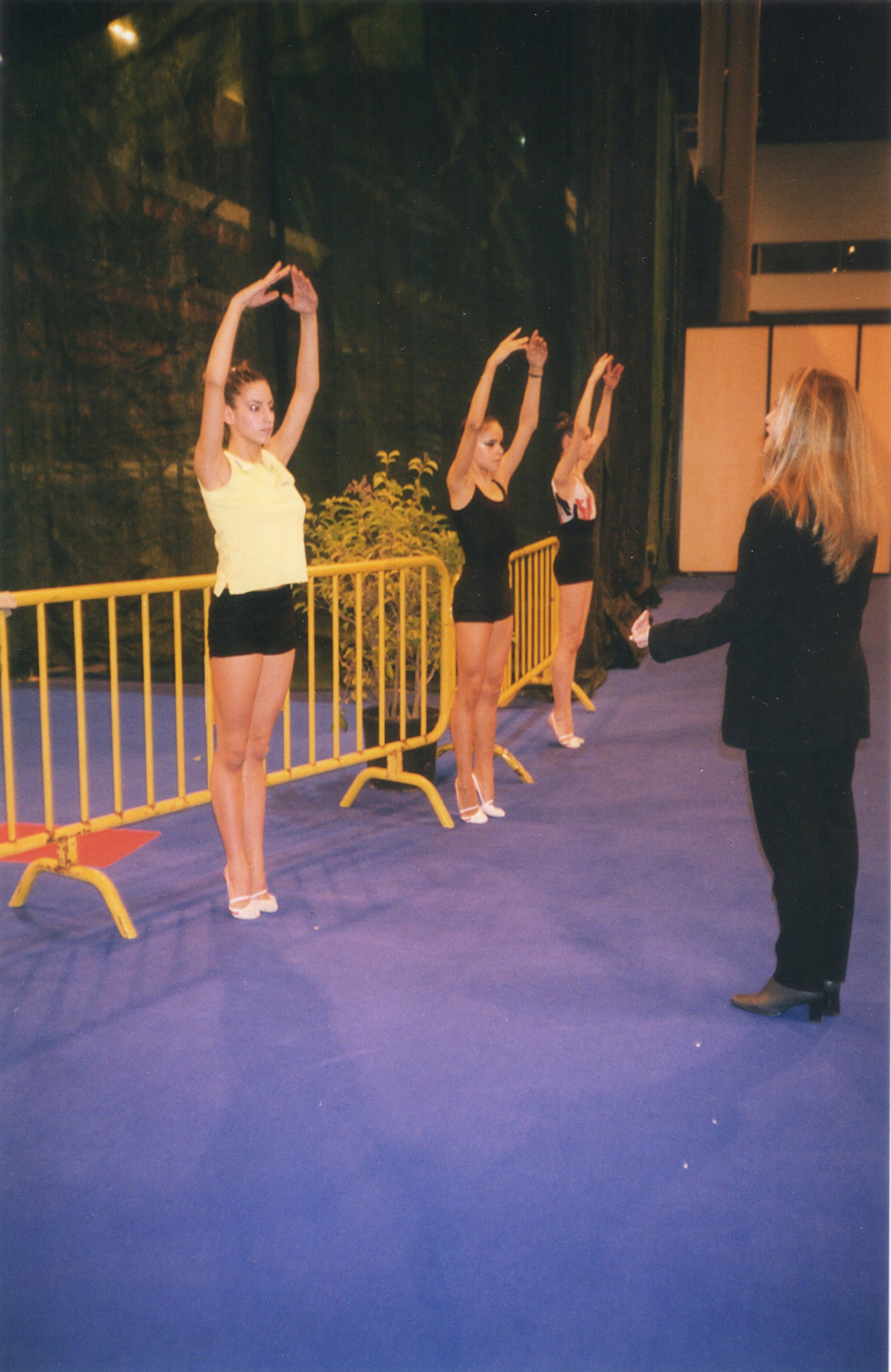 Almudena Cid, Jennifer Colino y Carolina Rodríguez en el Campeonato Mundial de Gimnasia Rítmica de Madrid en 2001.